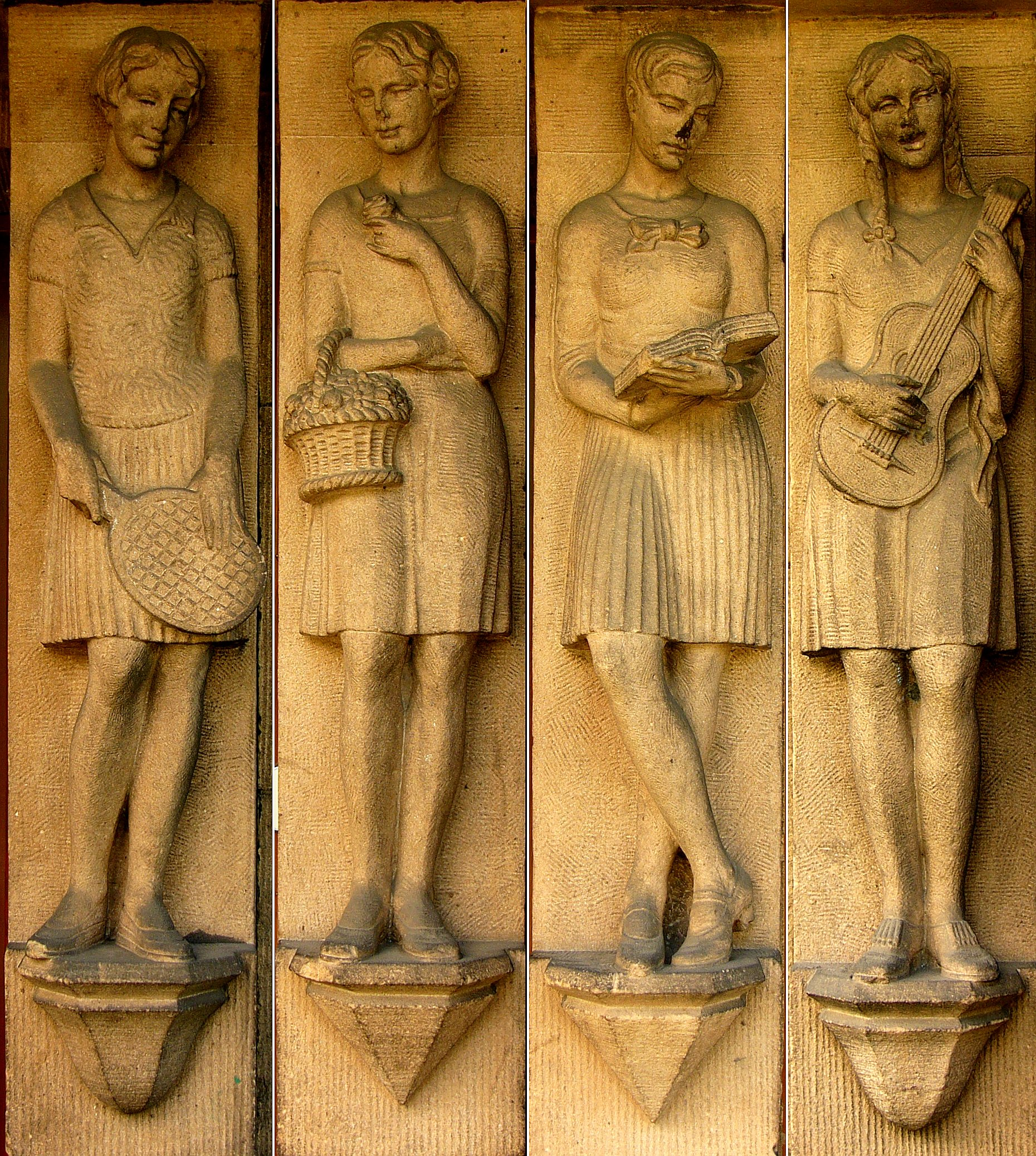 Vier Schülerinnen, Skulpturen von Bildhauer Hans Dammann am Eingang des 1928-1930 erbauten ehem. Eichendorff-Oberlyzeums in Gleiwitz